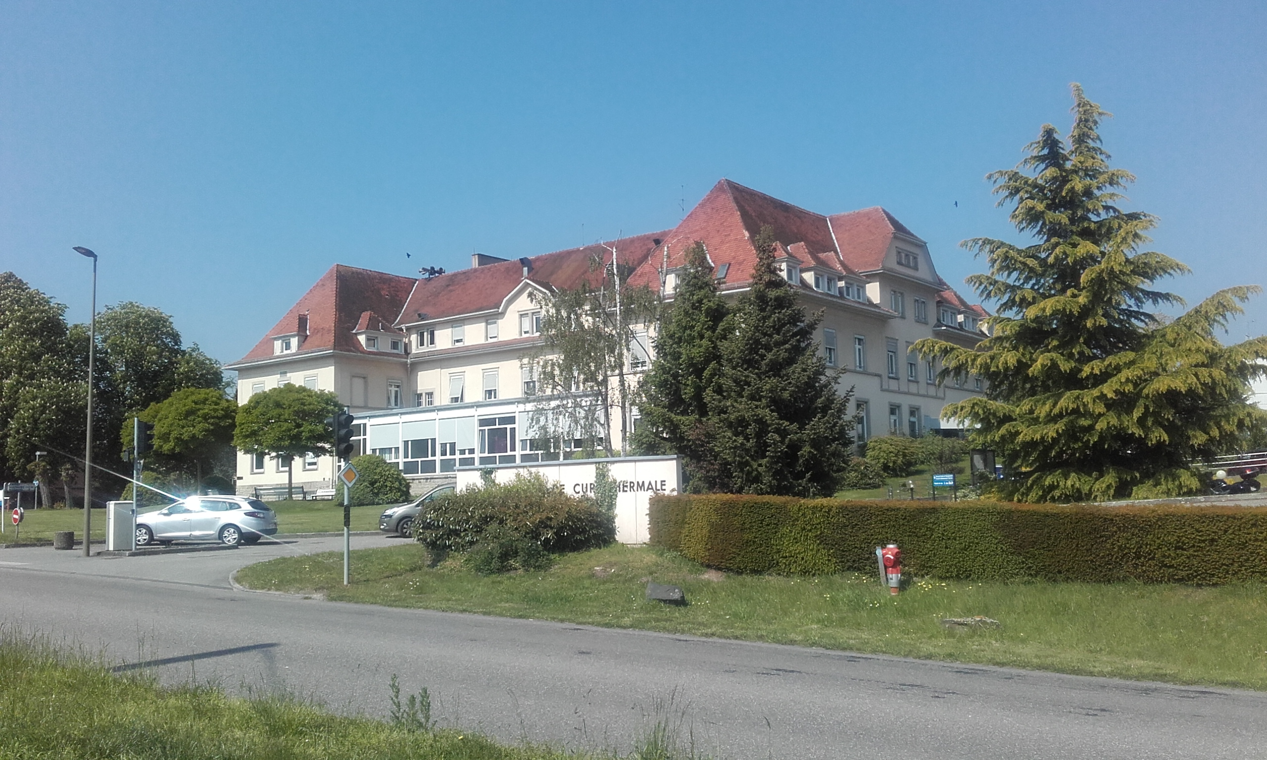 Bas-Rhin, Morsbronn-les-Bains, Thermes ValVital. Cures thermales, rhumatologie